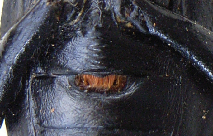 Blaps lethifera (nach Freude-Harde-Lohse), Bürstenfleck auf der Körperunterseite